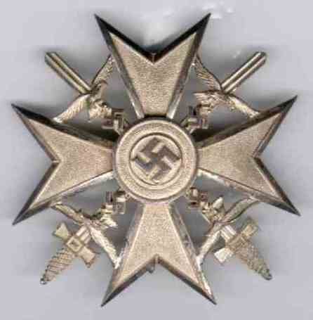 španělský kříž ve stříbře s meči